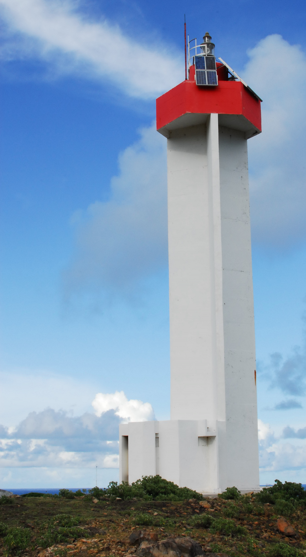 Phare de la Pointe Doublé à La Désirade Guadeloupe